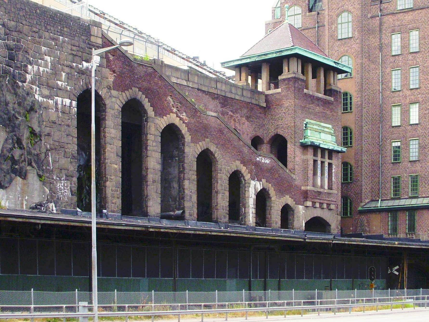 Lokattens trappa vid Saltsjöbanans gamla slutstation